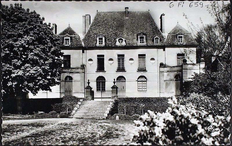 Château de la Vesvre de La Celle-en-Morvan Saône-et-Loire